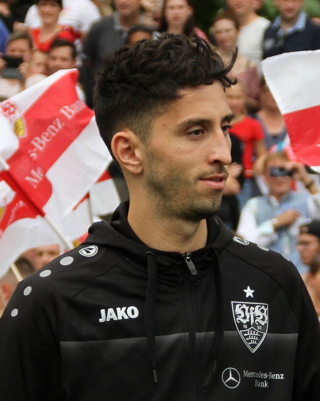 Atakan Karazor beim Auftakttraining 2019. Aufgenommen von